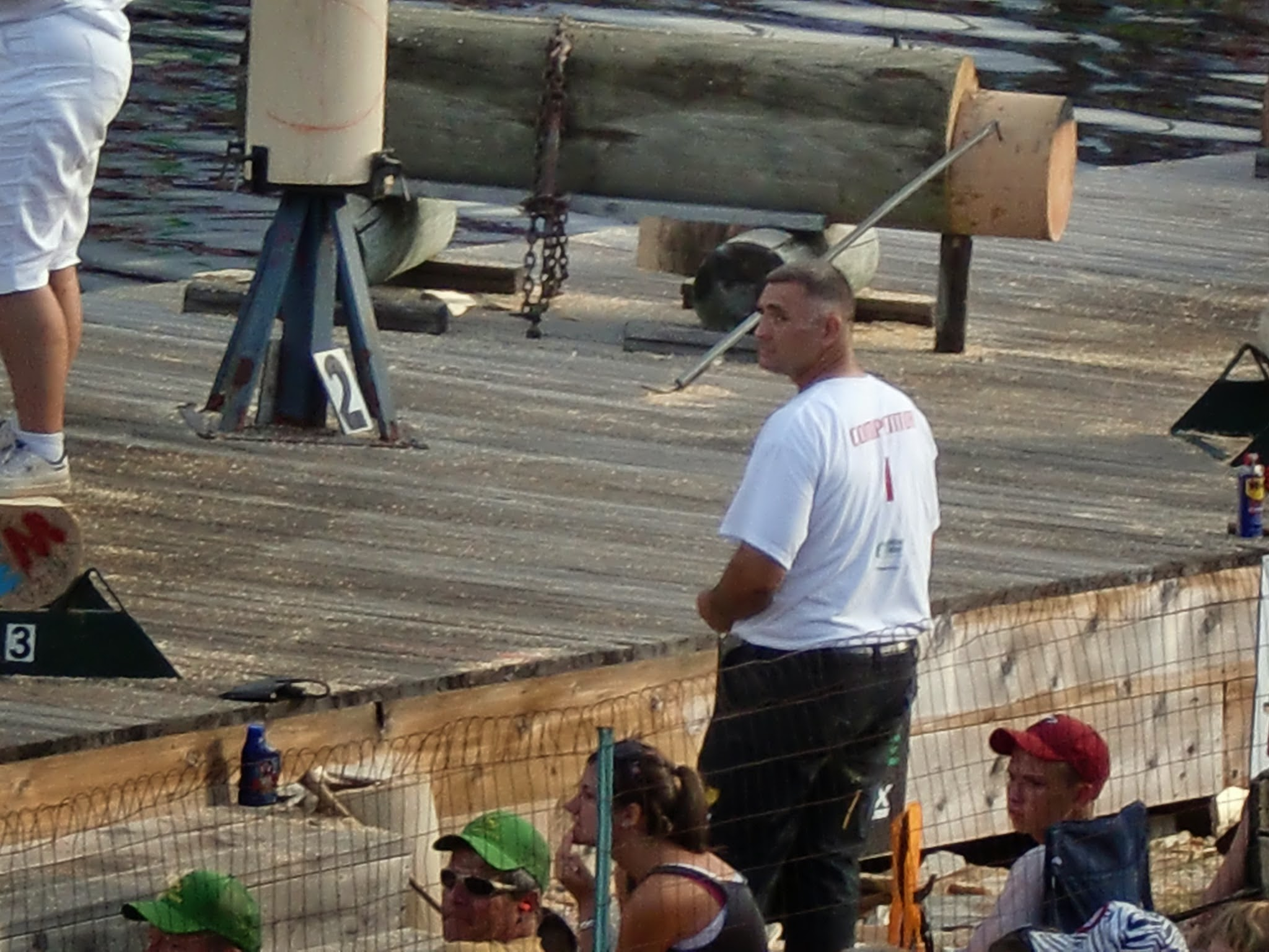 Jason Wynyard